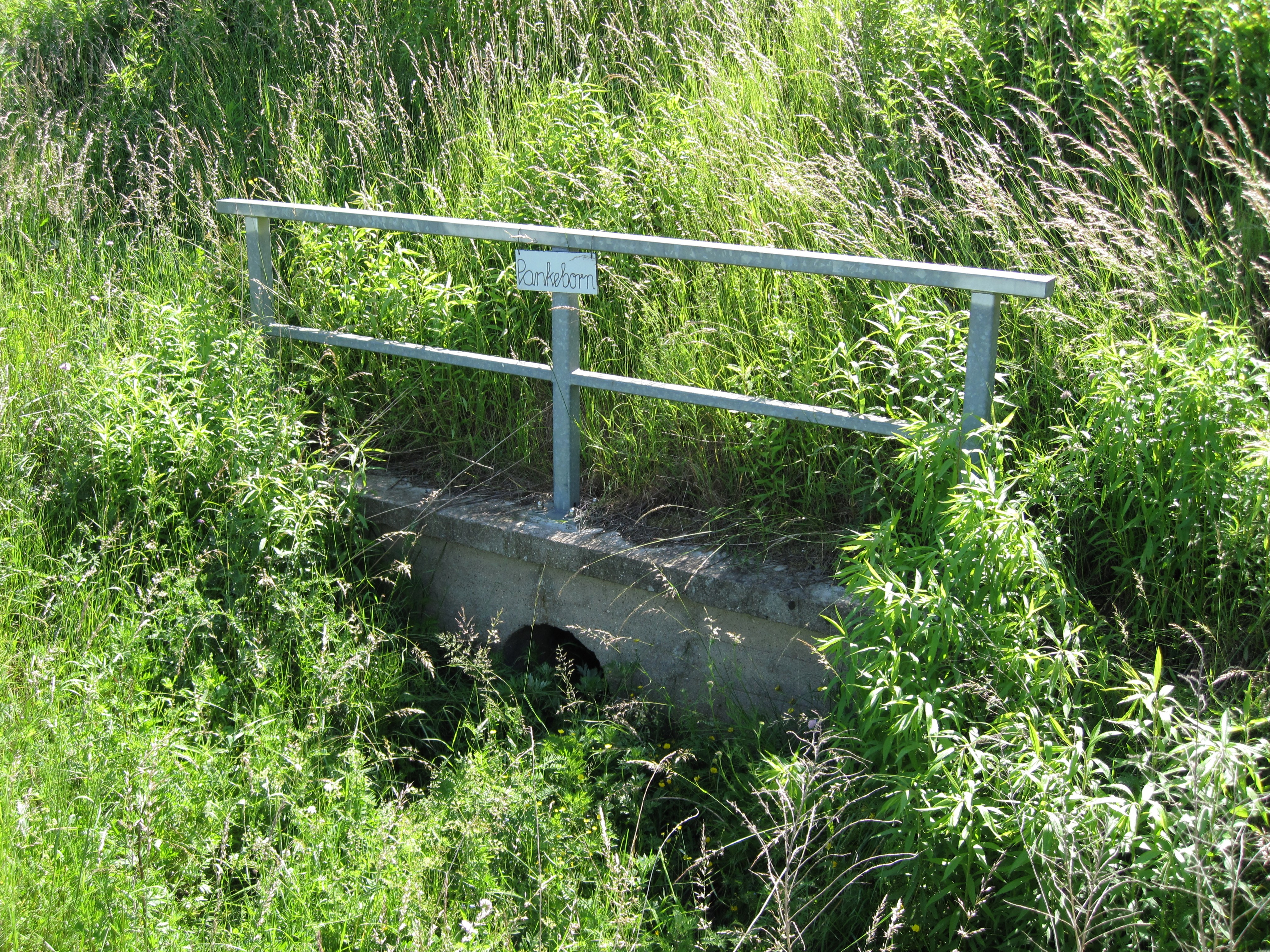 Bahnunterführung (Westseite) des beginnenden Pankegrabens nördlich des Bernauer Ortsteils Pankeborn